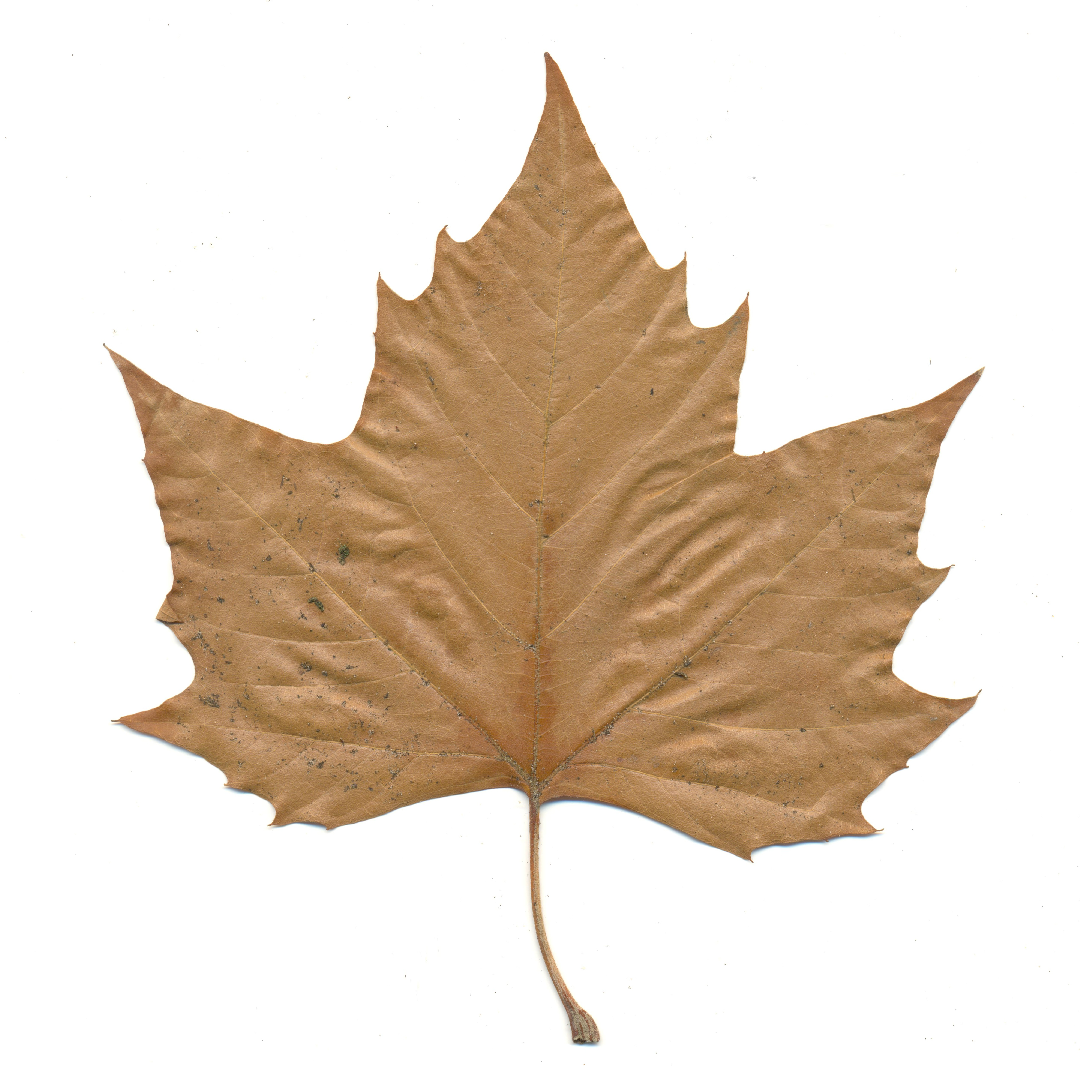 Een bruinig herfstblad.